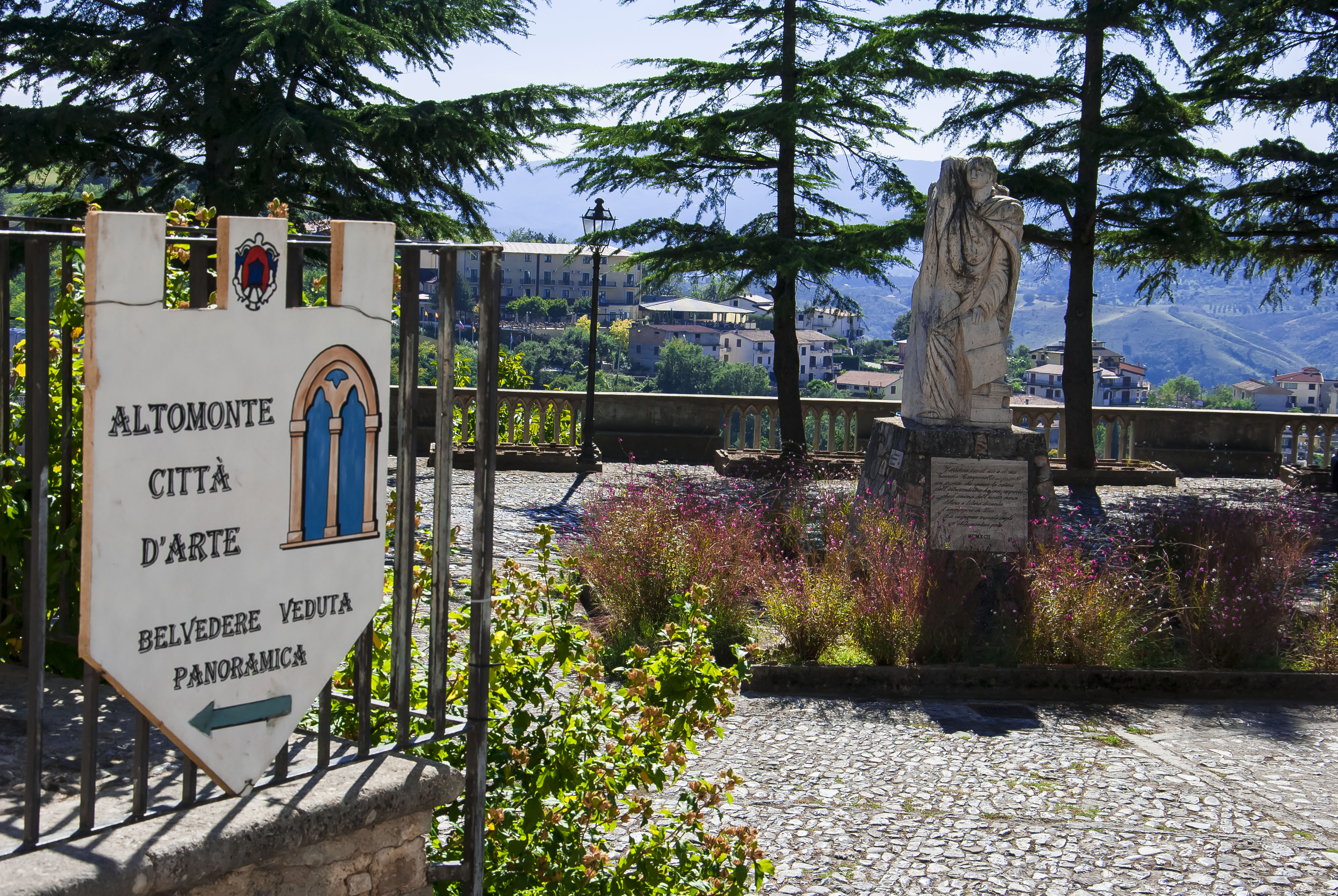 Piazza Tommaso Campanella This is a photo of a monument which is part of cultural heritage of Italy.